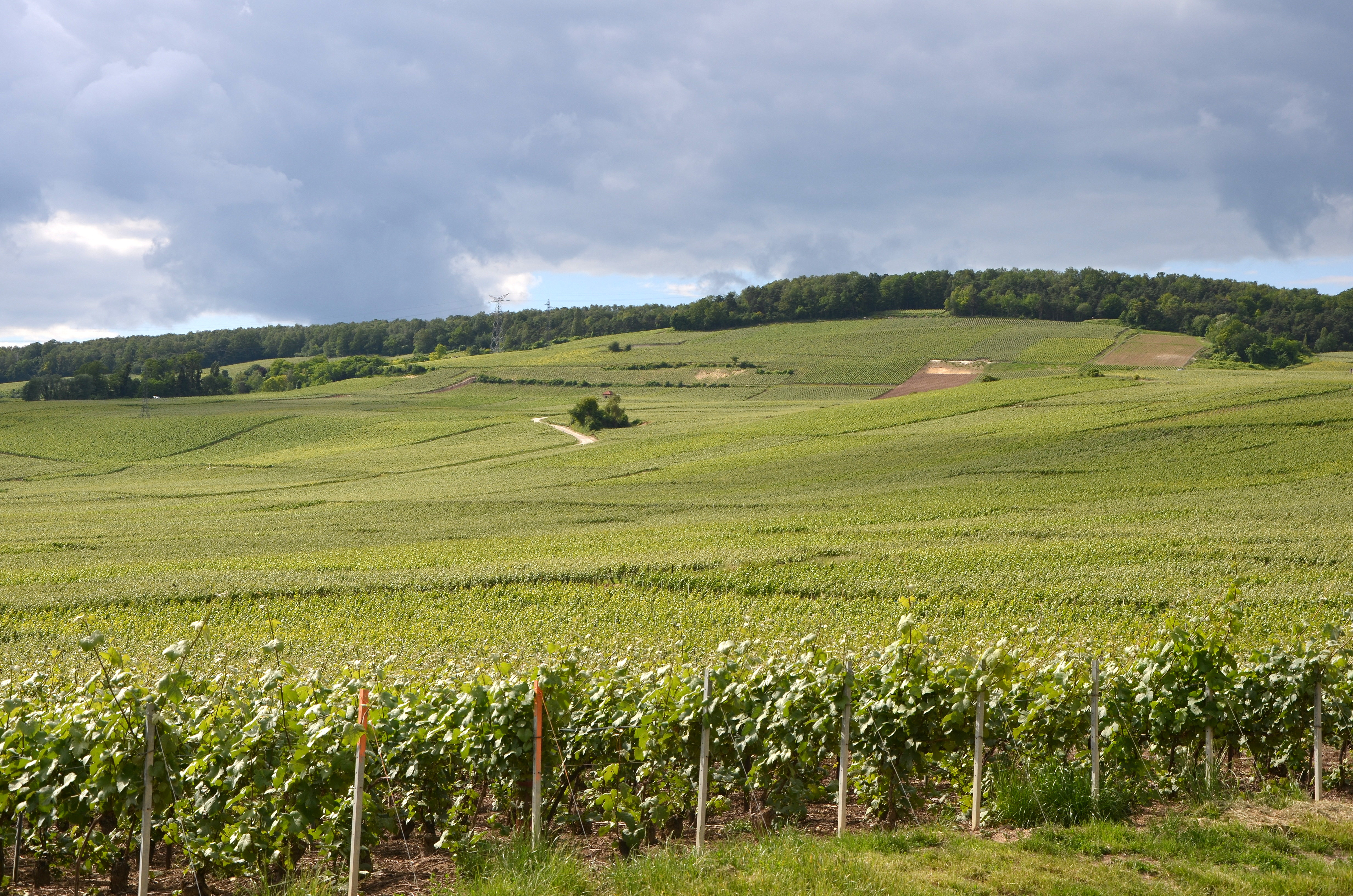 Vignoble au-dessus de Damery, Marne, France